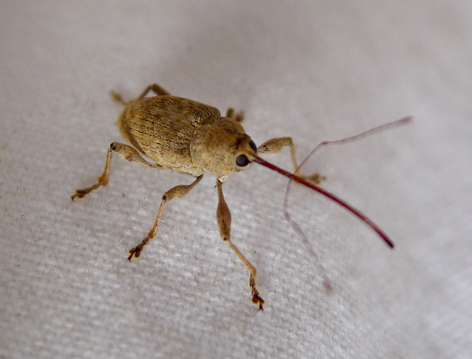 Jimena Andalucia, Spain